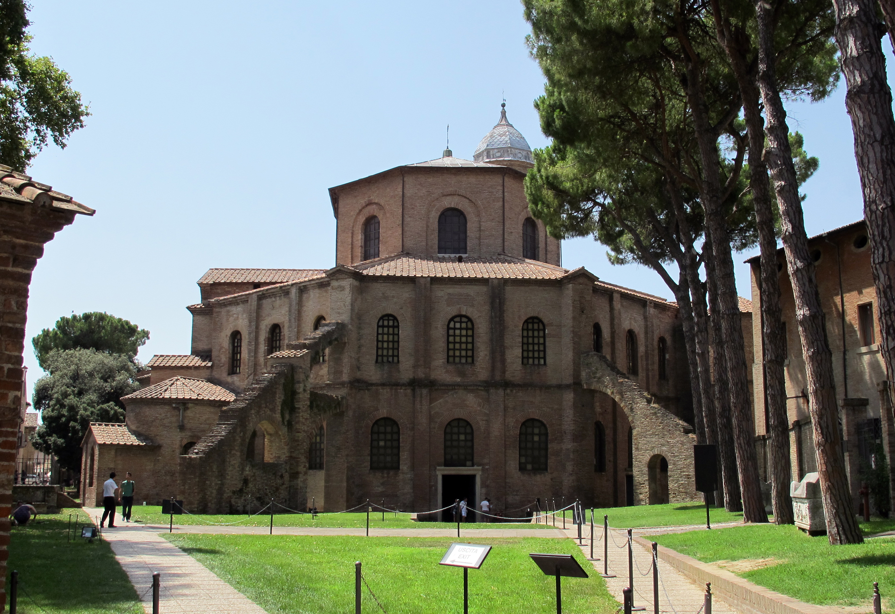 Basilica di San Vitale - MIBAC This is a photo of a monument which is part of cultural heritage of Italy.